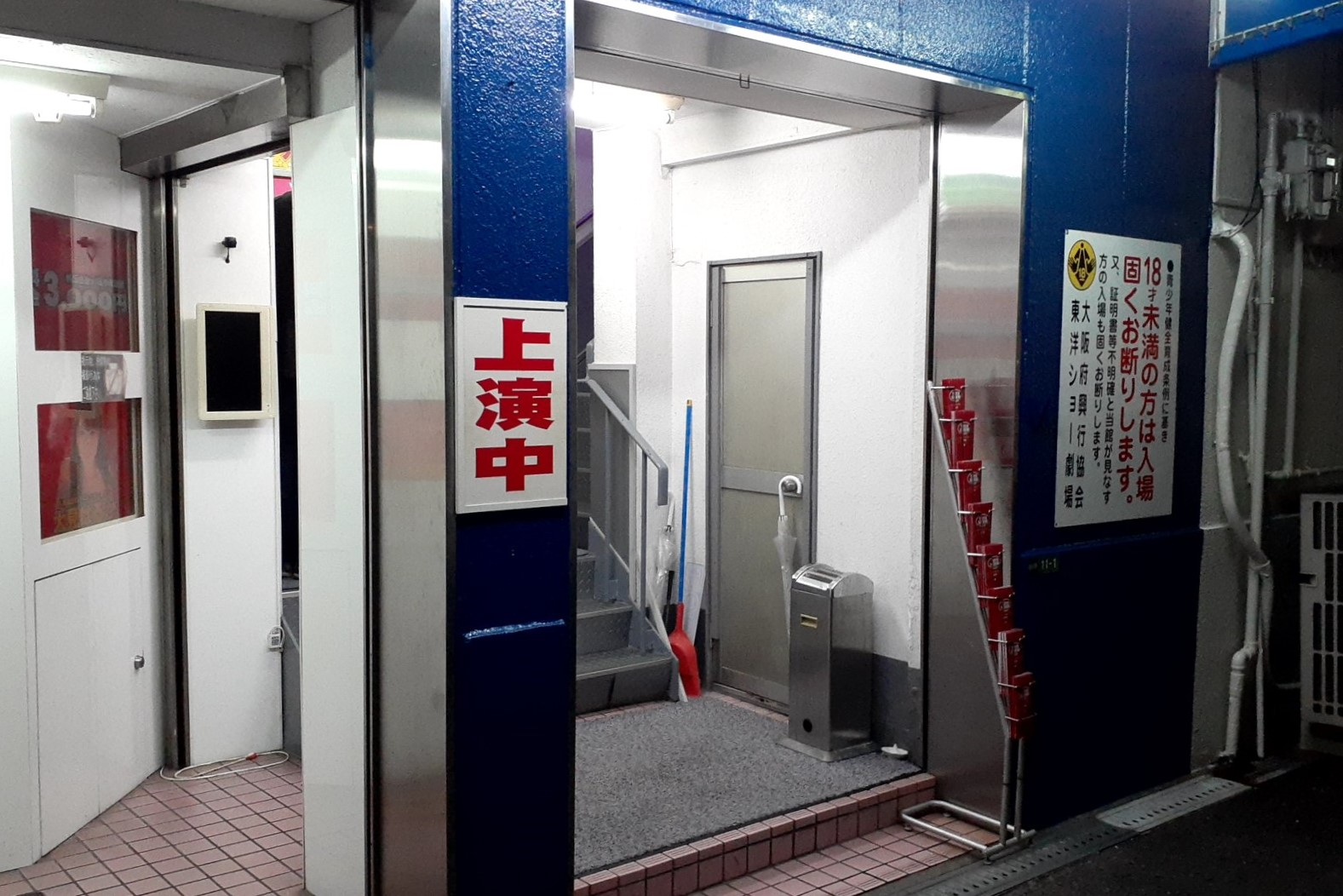 大阪府大阪市北区にあるストリップ劇場「東洋ショー劇場」。